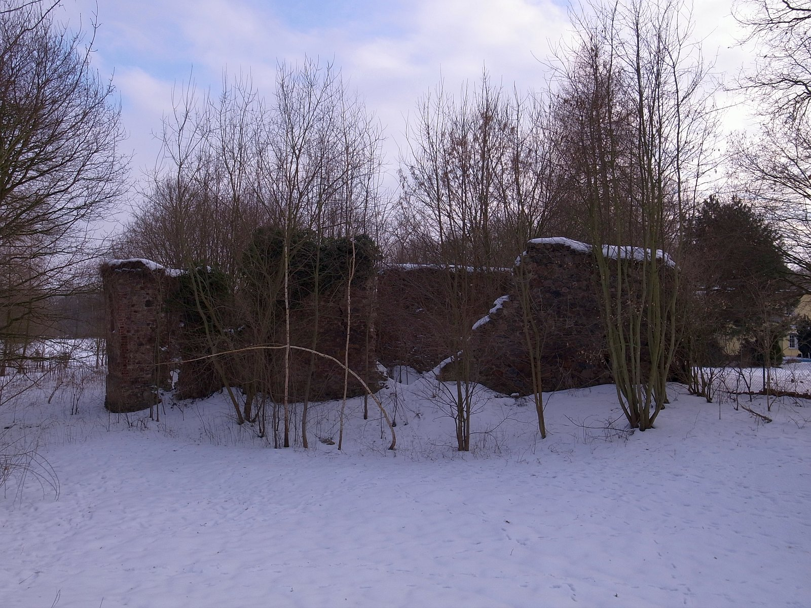 Jeßnitz, Salegaster Straße; Kirche (Ruine Salegast) Koordinaten: N51 40.530 E12 18.161